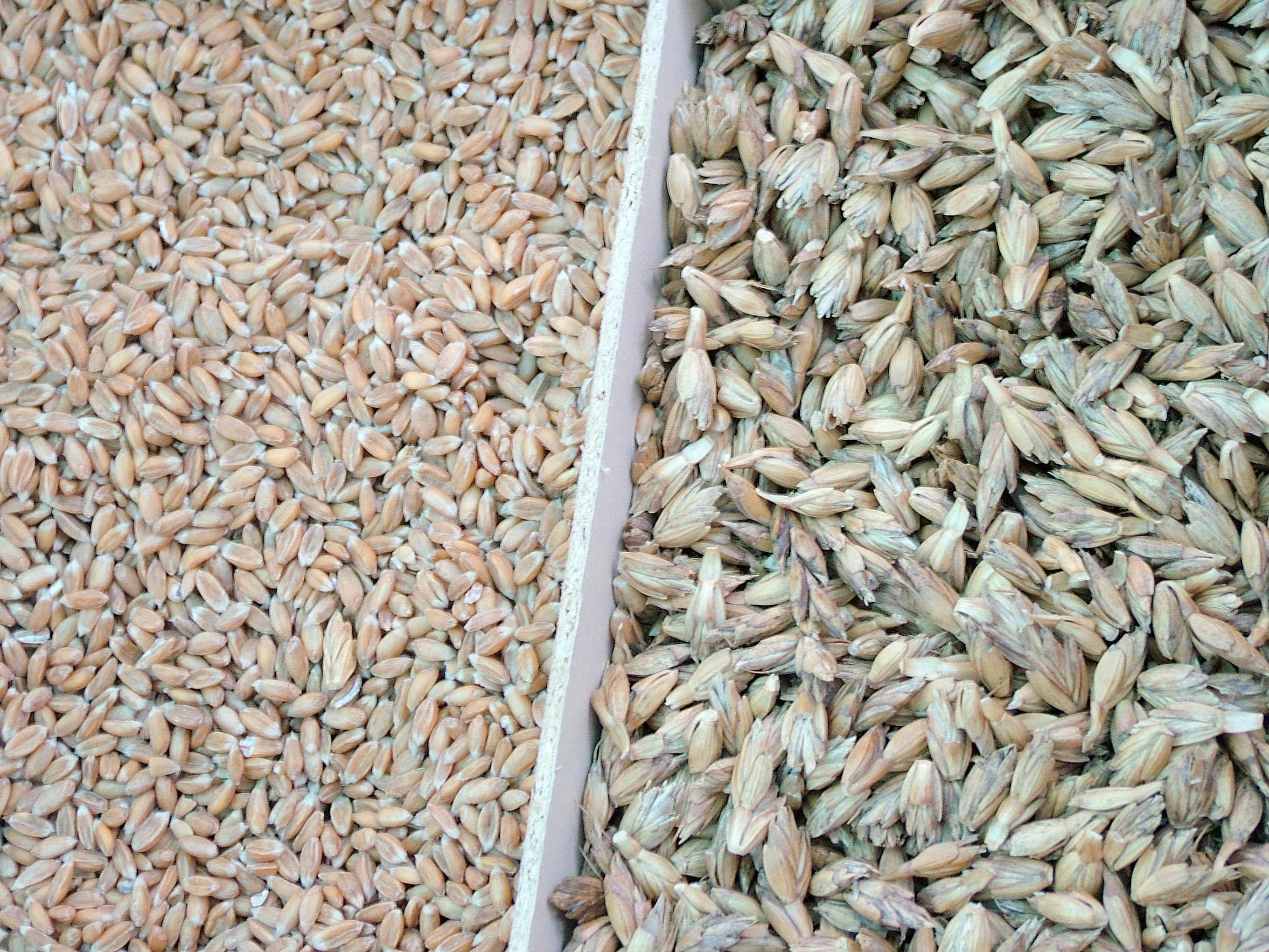 Silvoldse Zomermarkt. Spelt. Dinkel, links entspelzt, rechts in Spelzen